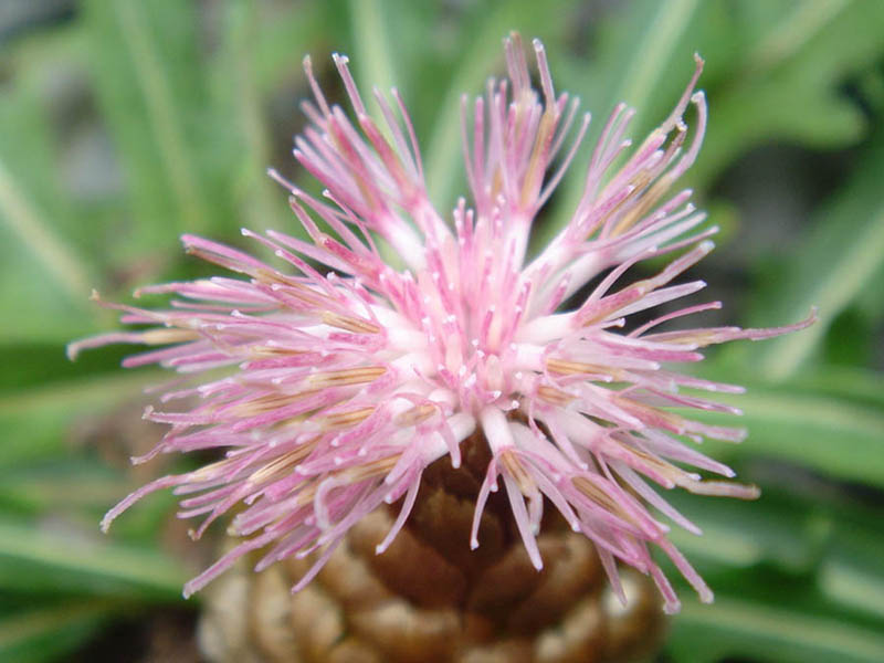 Leuzea conifera